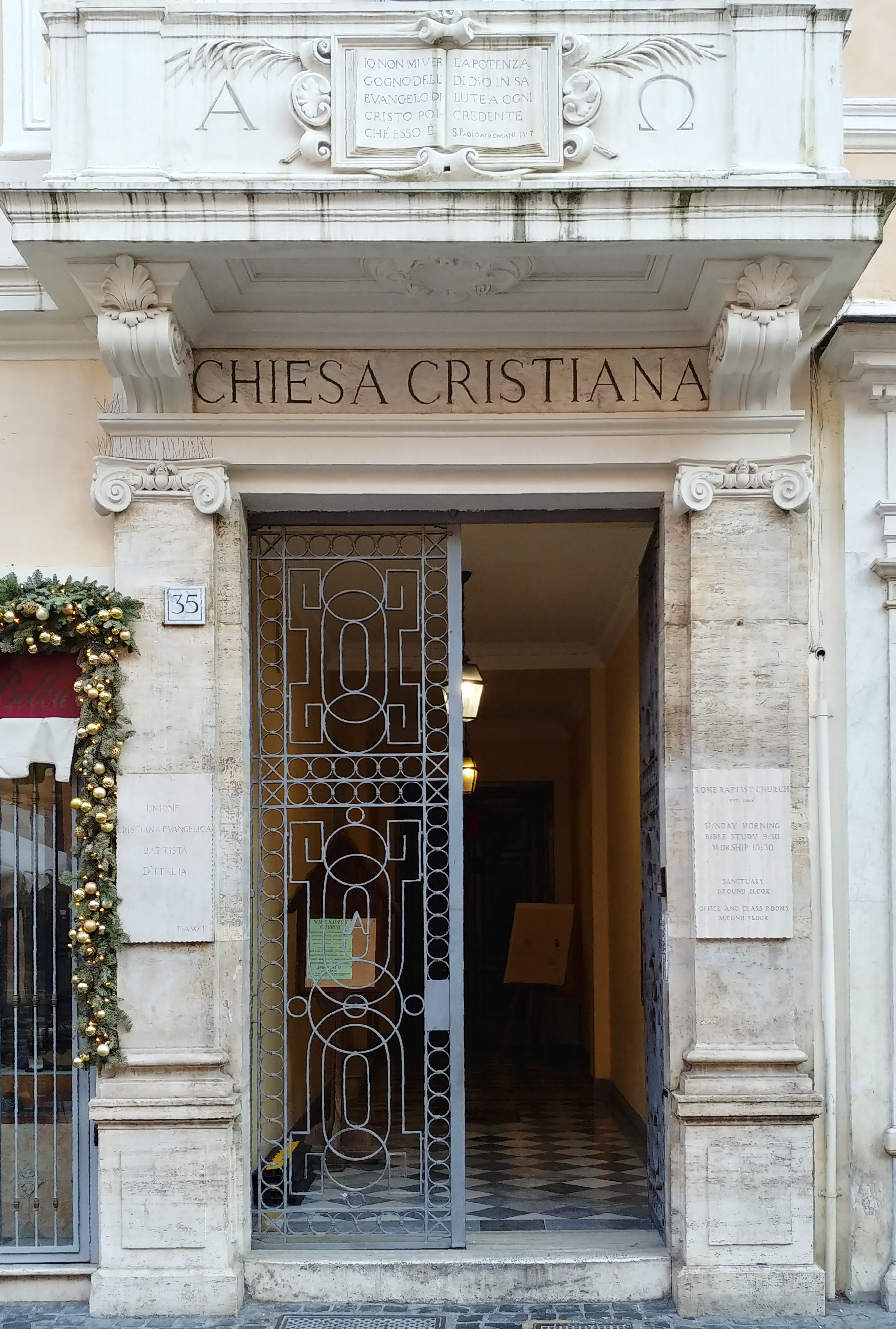 Portone d'ingresso.